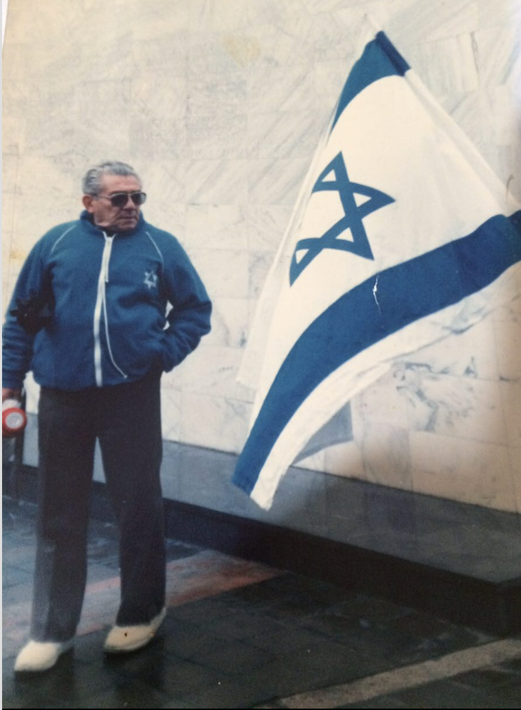 אליהו רוזנברג במסע לפולין